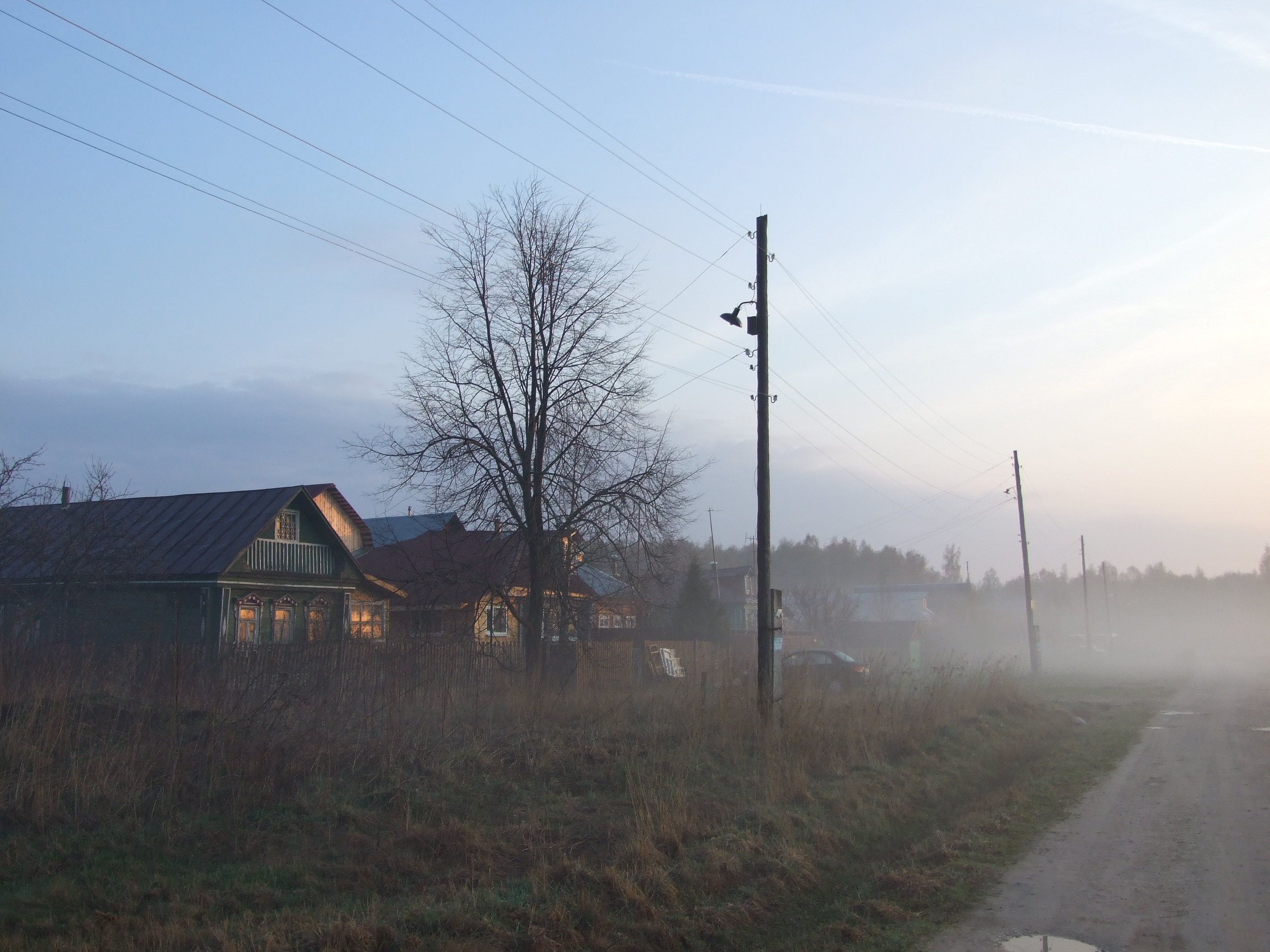 Дома